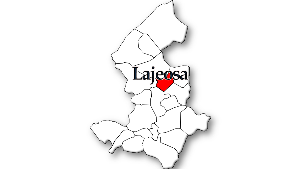 População